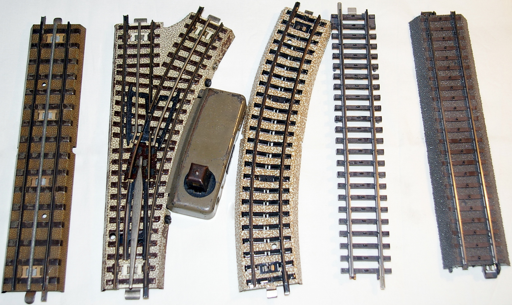 Märklin-H0-Schienentypen. Es fehlt das Modellgleis. Eigenes Foto vom 21.05.2006. GFDL-GNU-Lizenz. [1]